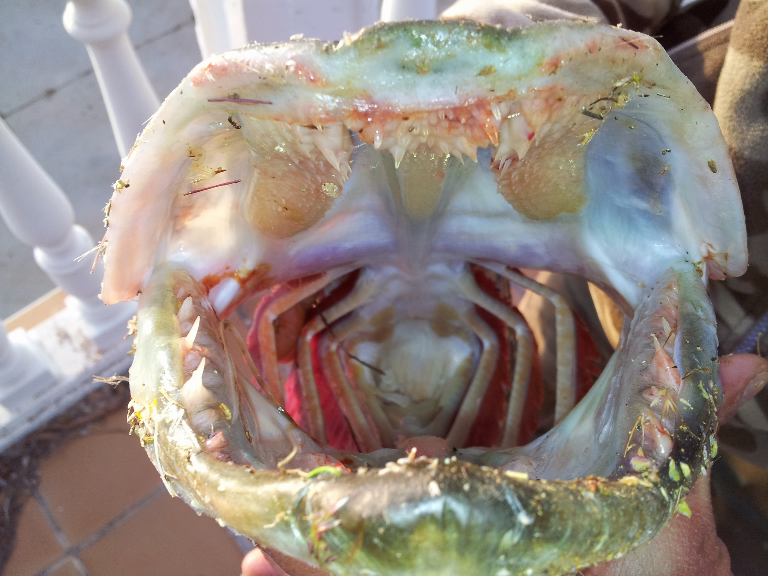 Mandíbulas abiertas y dentición de un lucio sacado en el embalse de Ricobayo en Zamora (España)